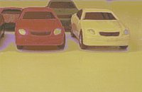 Voorbeeld van het effect van het gemiddelde nemen van meerdere foto's. Deze afbeelding is het gemiddelde van 250 foto's. Zie ook: nl::Afbeelding:Example-average-1.jpg. Eigen werk. Gemaakt met behulp van gratis en vrij te gebruiken software 'ImageMagick'.